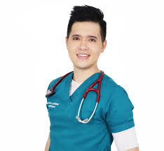 Foto dr. Vito Damay